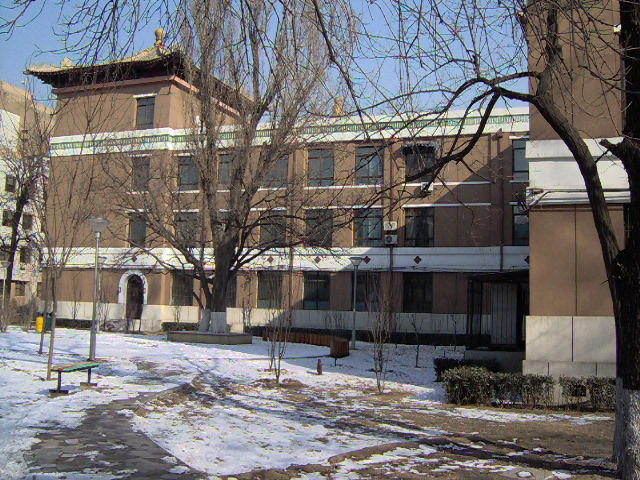 中文（中国大陆）: 中国矿业大学（北京）民族楼一角